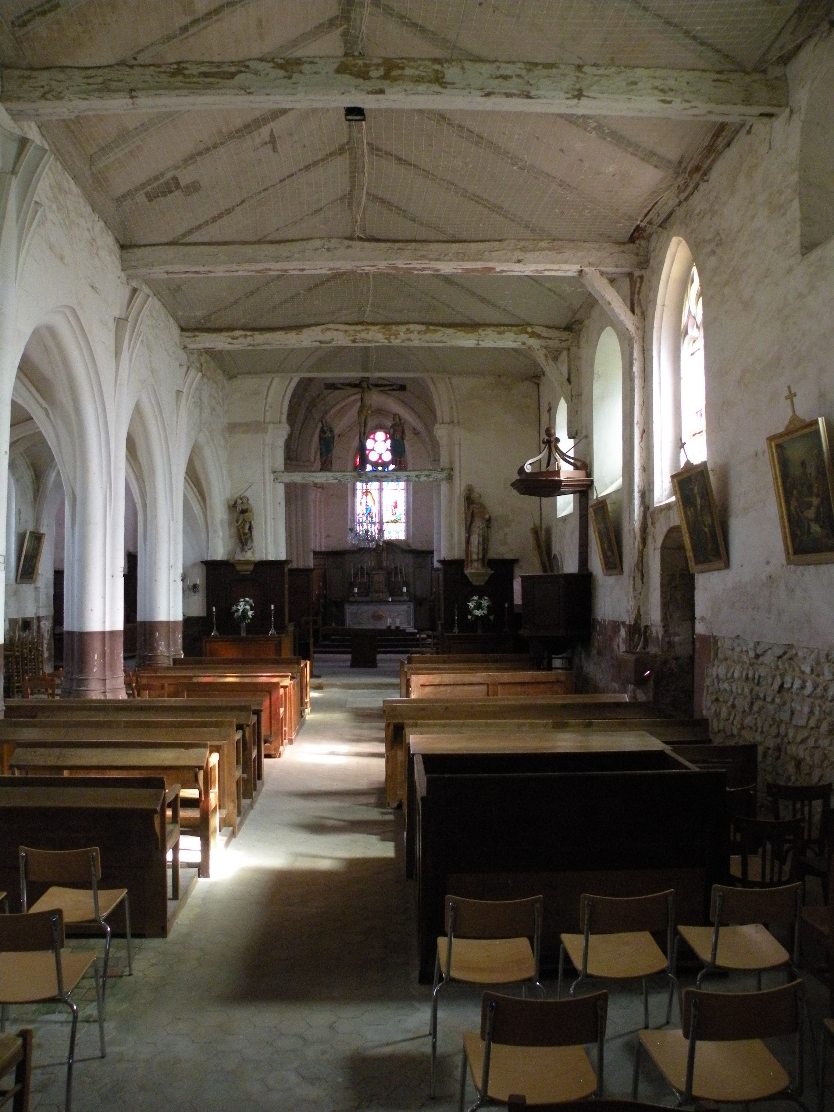 Église Saint-Martin de Lierville